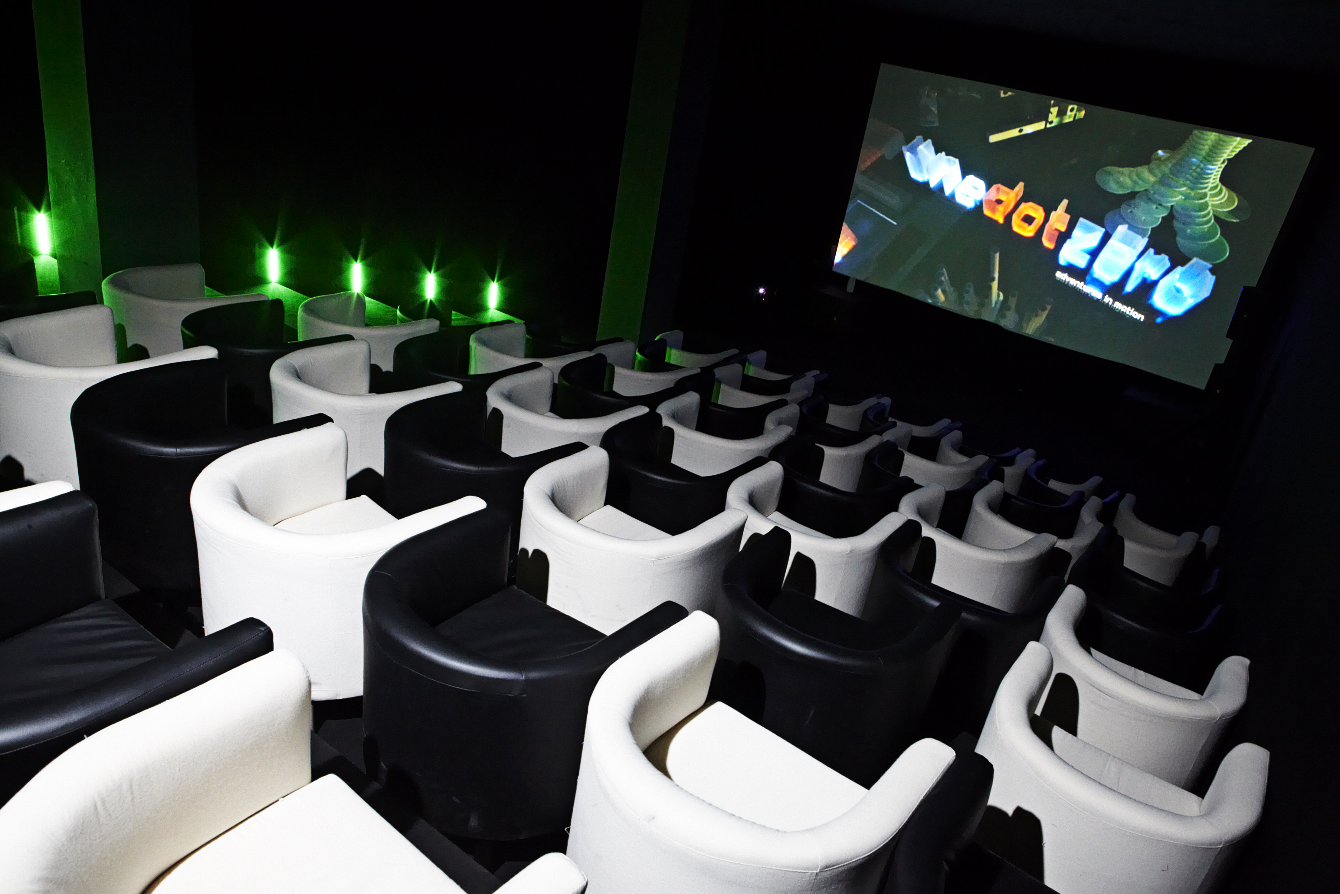 Yota Space 2010. Кинозал